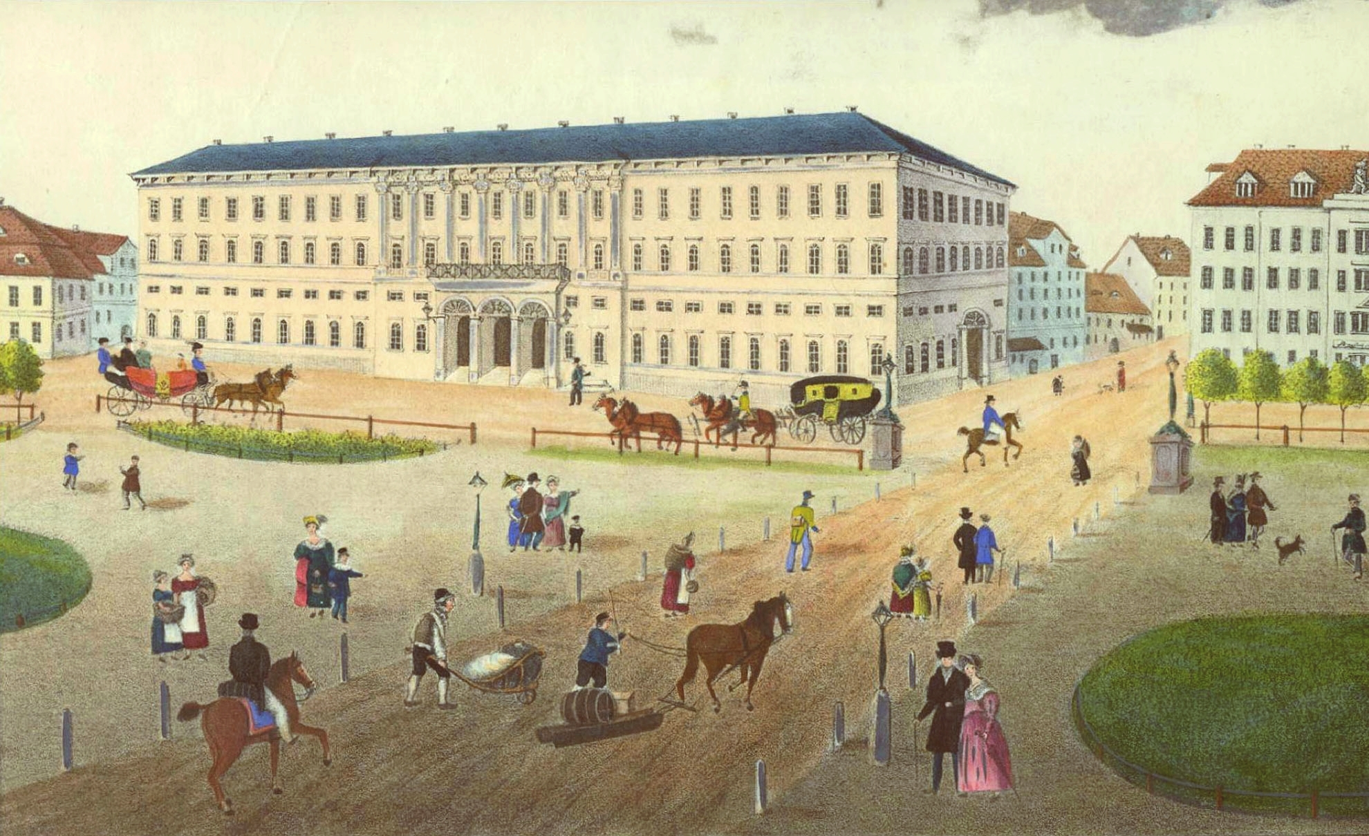 Das neue Postgebäude in Leipzig, farbige Lithographie von Radegast